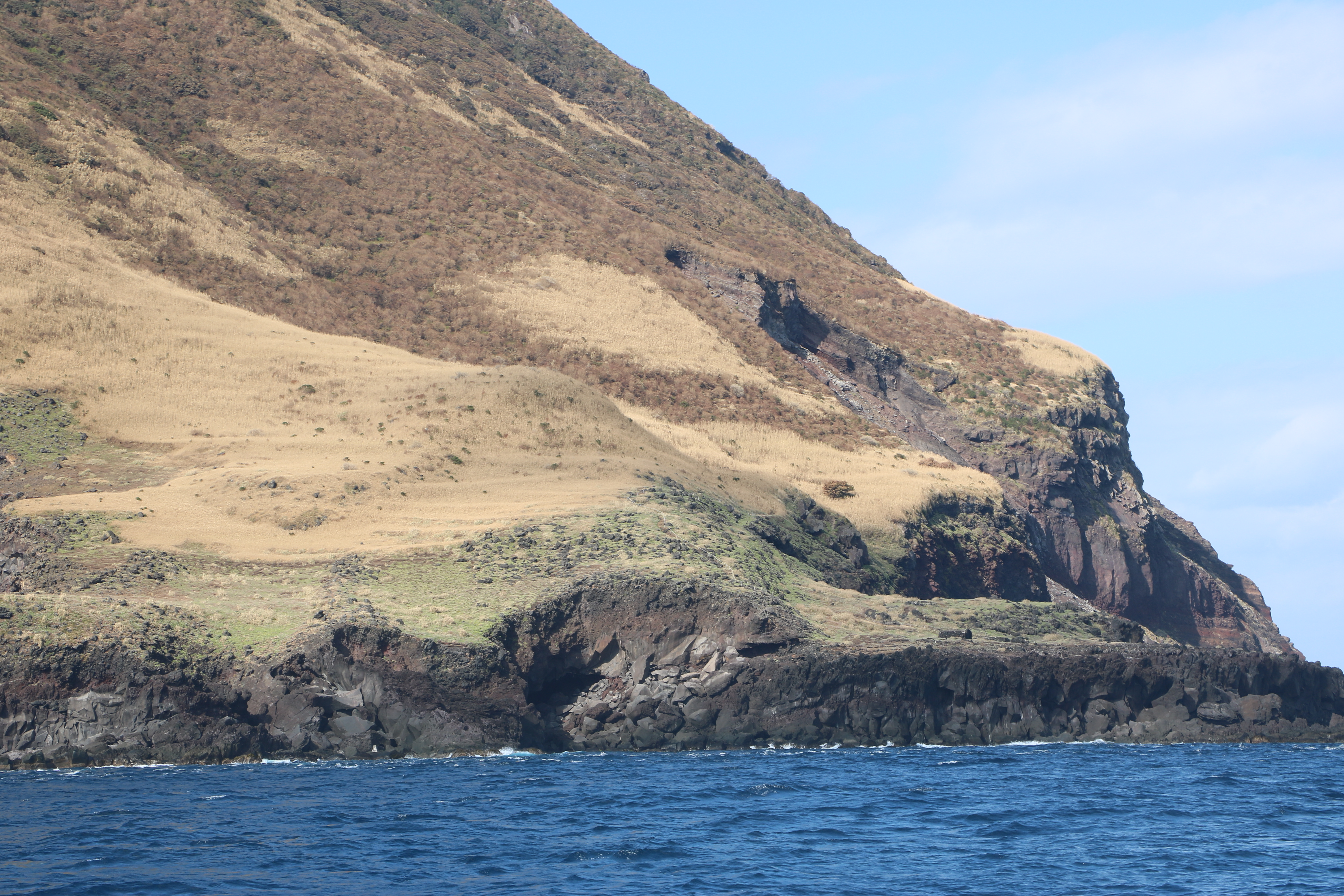 八丈小島宇津木地区を海上から望む（東京都八丈町）